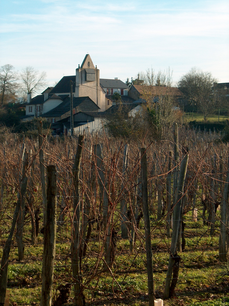 Village de Saint-Faust (de bas) dans le vignoble du Jurançon, vignes, propriété de M. Burgué Henri. Vue de l'église de Saint-Faust de bas avec son clocher mur.